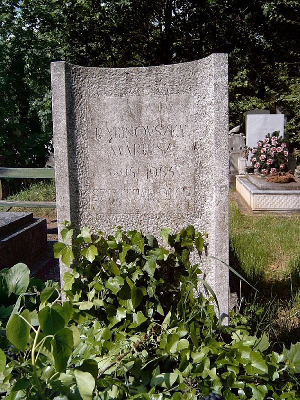 Rabinovszky Máriusz (Bp., 1895. dec. 14. – Bp., 1953. febr. 7.): művészettörténész és felesége Szentpál Olga (Bp., 1895. dec. 14.–Bp., 1968. okt. 31.) mozgásművésznő, koreográfus, pedagógus és szakíró sírja Budapesten. Új köztemető: 33/1-1-124.